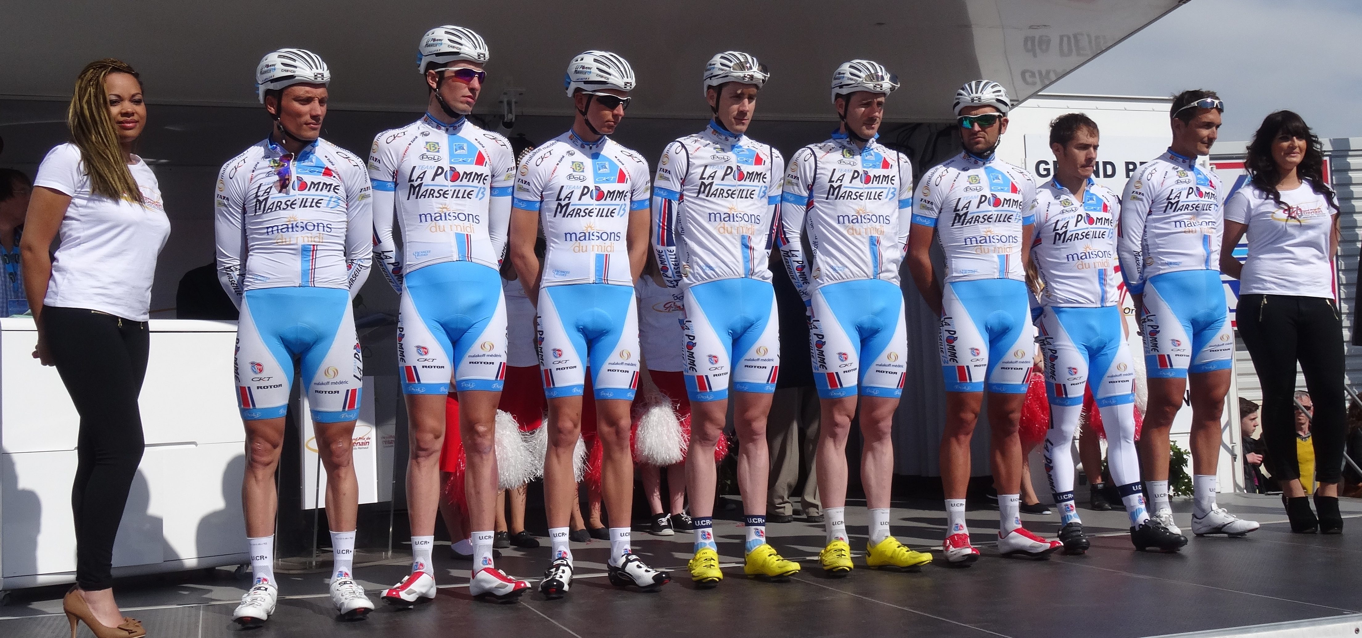 Reportage réalisé le jeudi 17 avril à l'occasion du départ et de l'arrivée du Grand Prix de Denain 2014 à Denain, Nord, Nord-Pas-de-Calais, France.